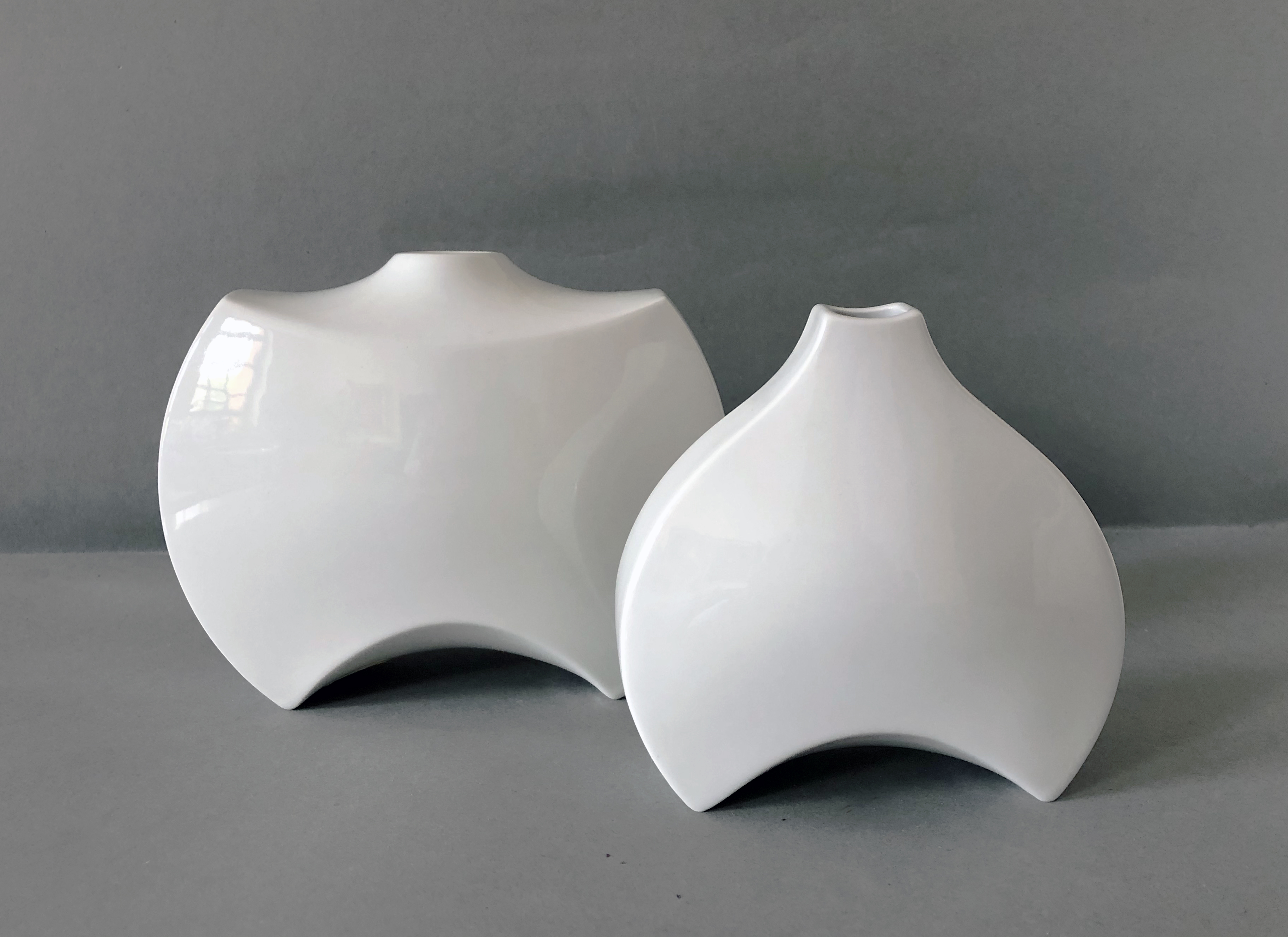 Vase aus der Kollektion KPM Berlin von dem Designer Konrad Quillmann entworfen